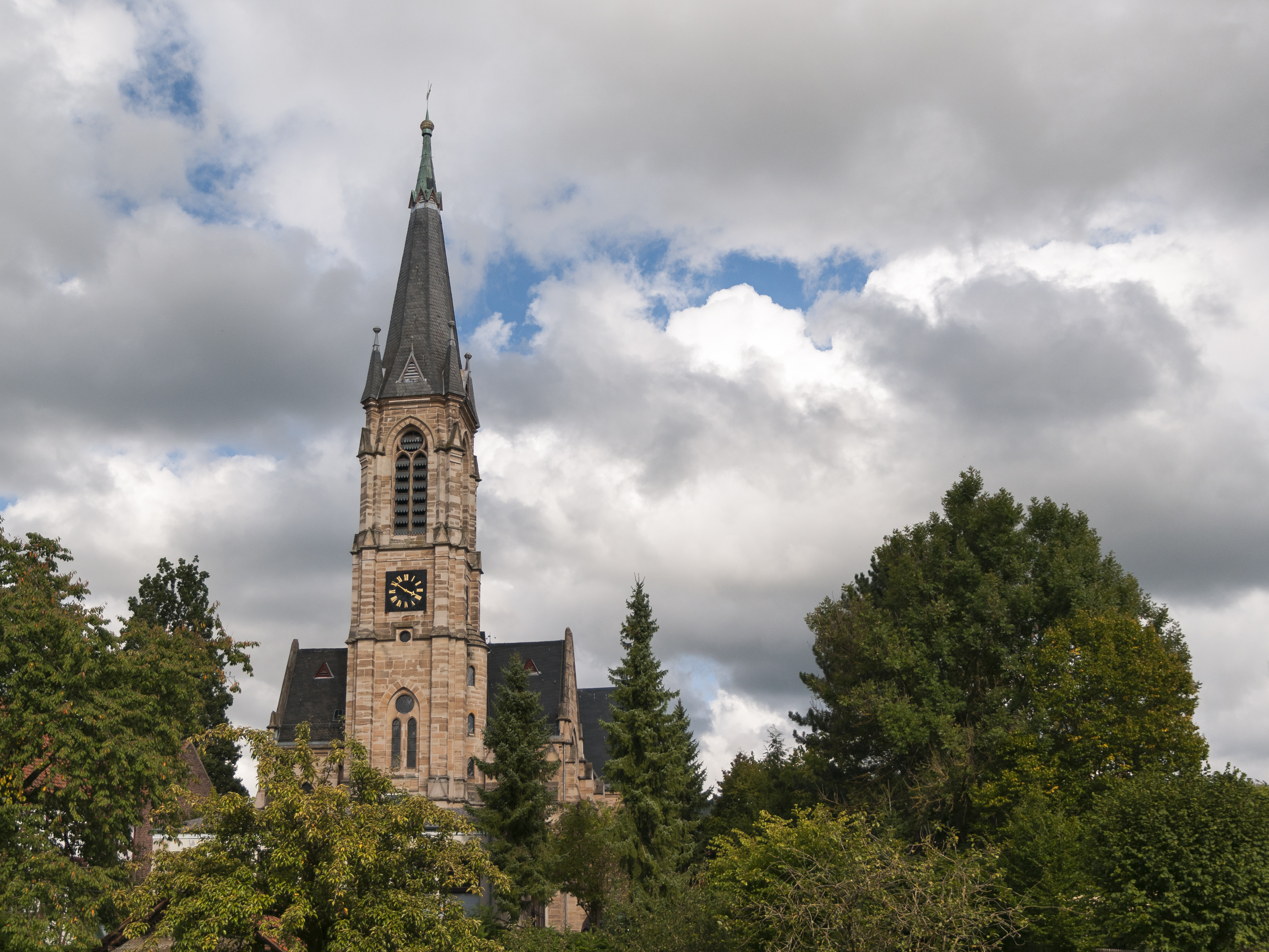 Ansicht aus West